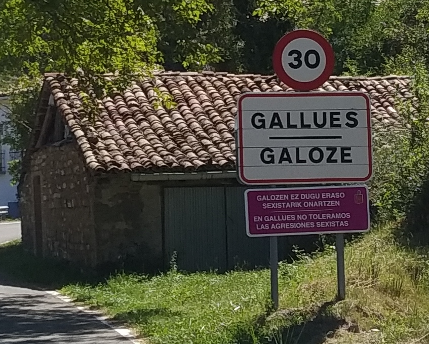 kontzeju eta herriburua